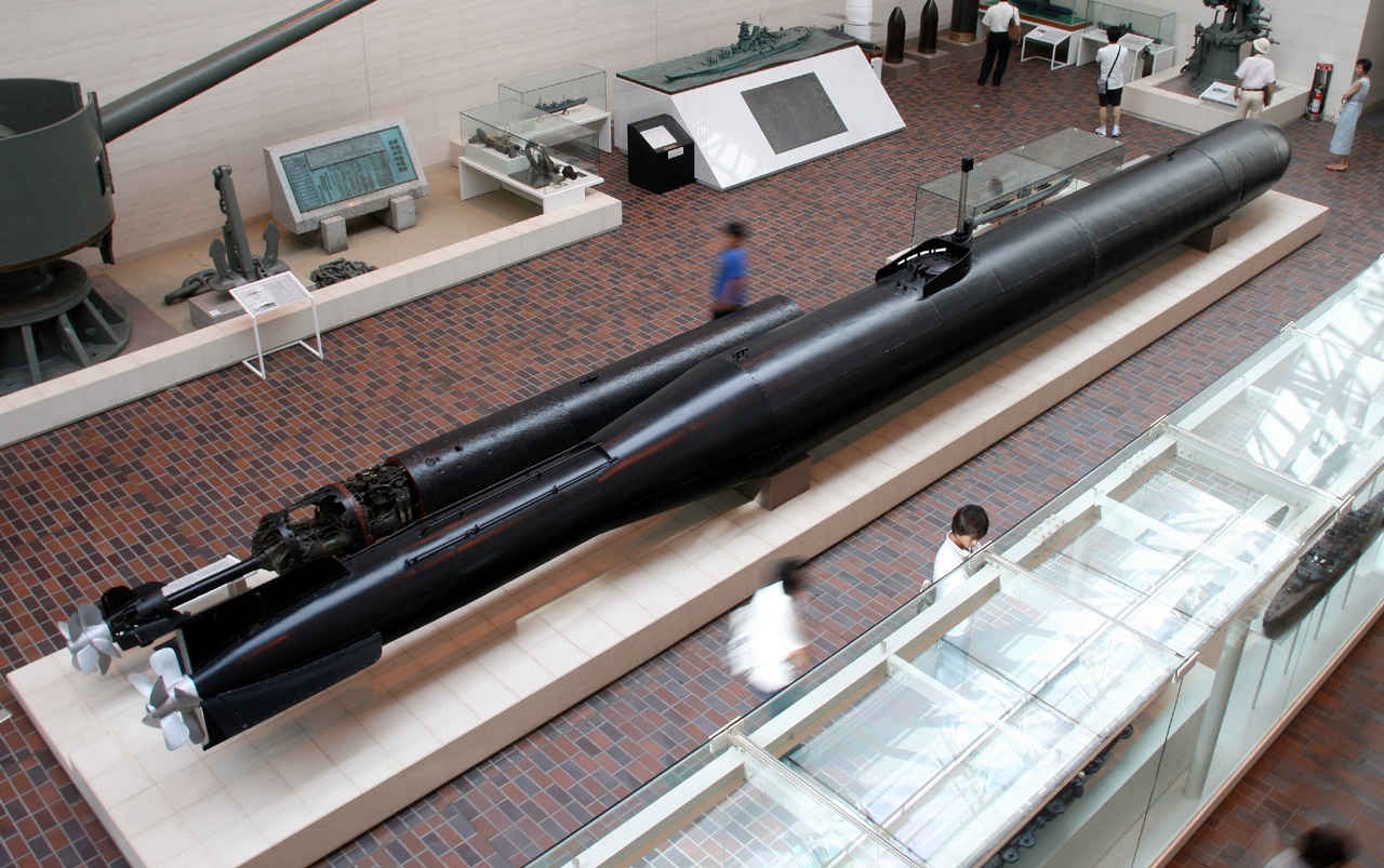 The Kaiten displayed at Yushukan.